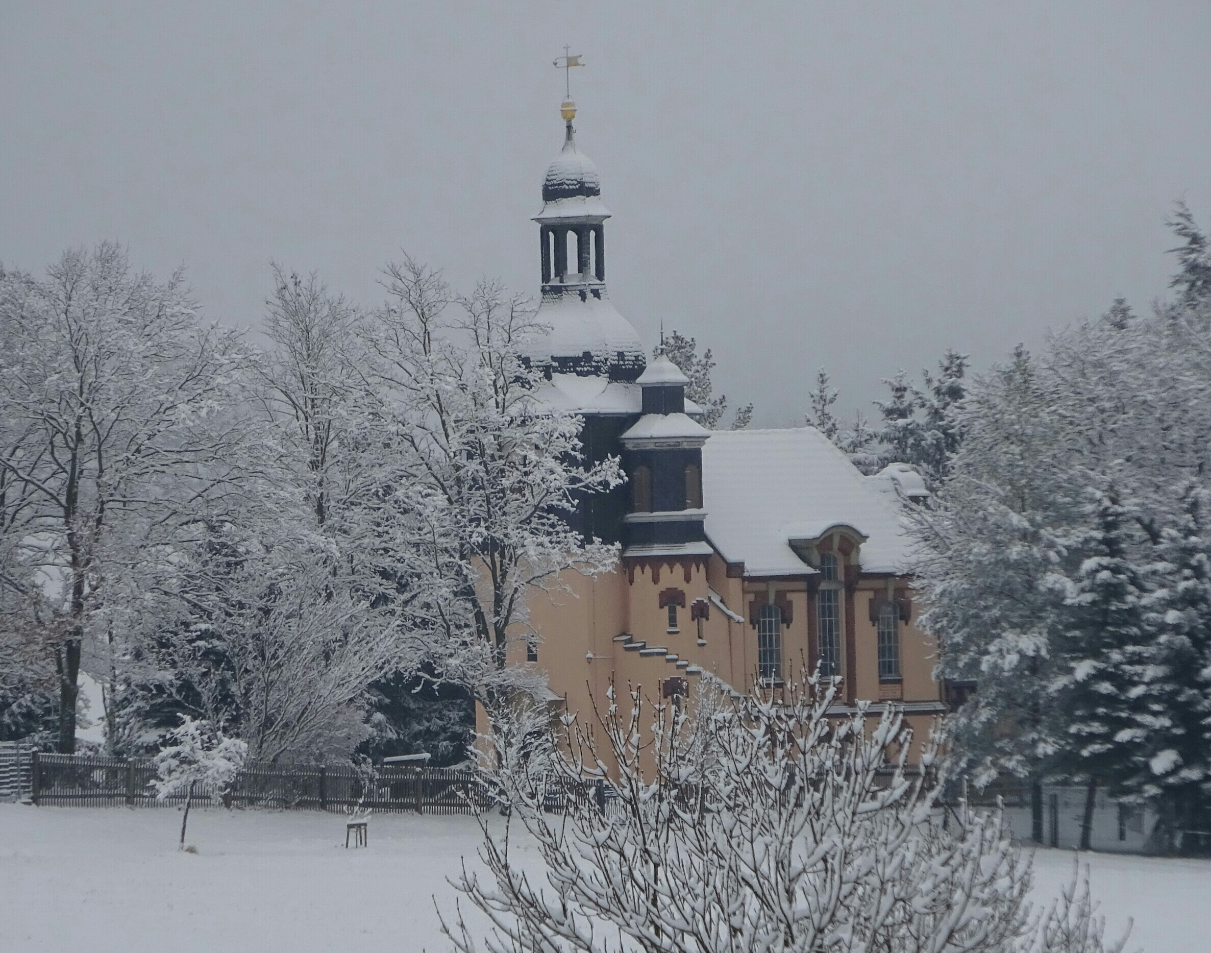 Die evangelische Kirche Traßdorf /Thüringen